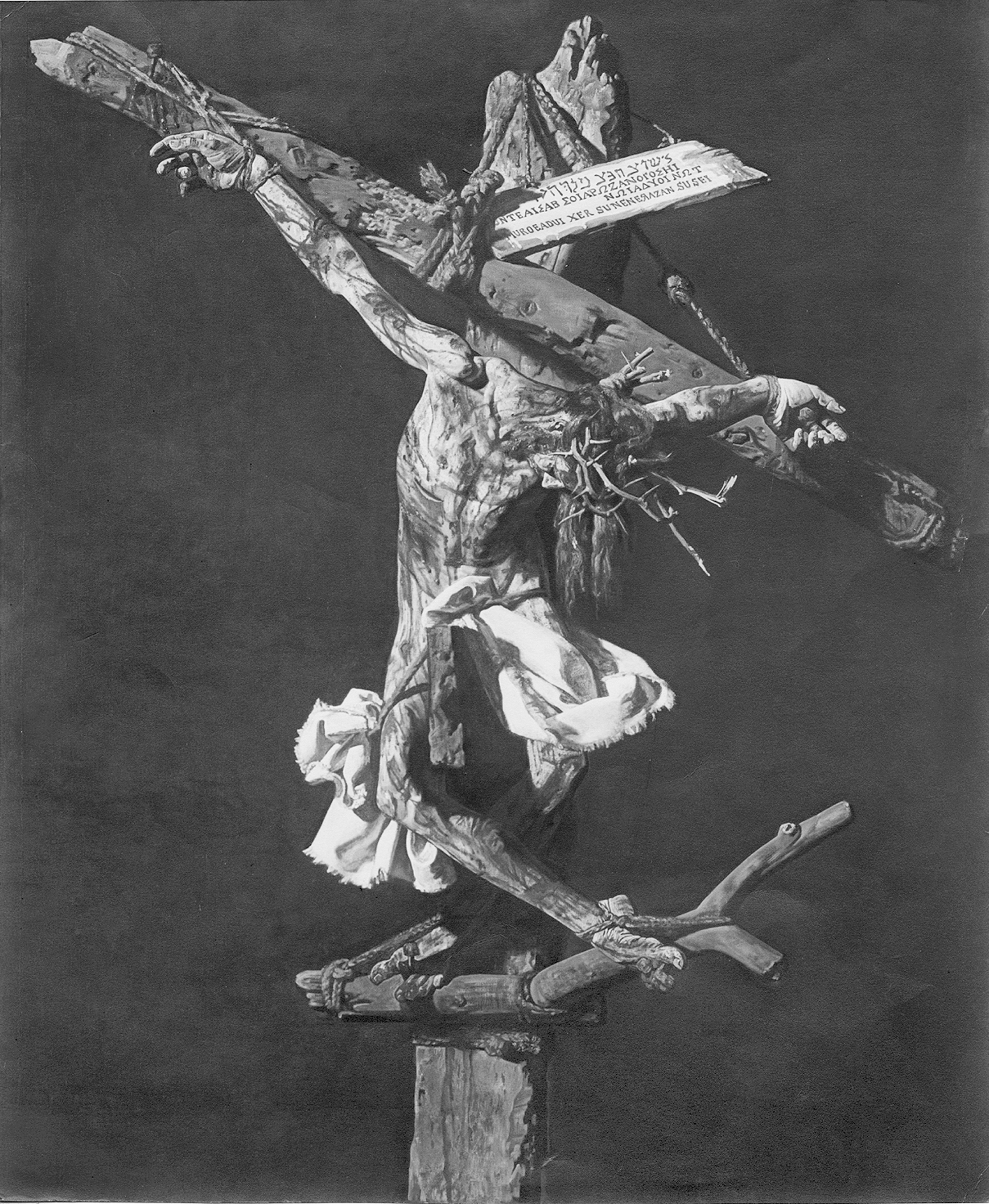 TITULO: Cristo en la Cruz. También llamado Cristo crucificado o Segundo Cristo. TÉCNICA: Óleo SOPORTE: Lienzo MEDIDAS: 340 x 400 cm. (Aprox.)